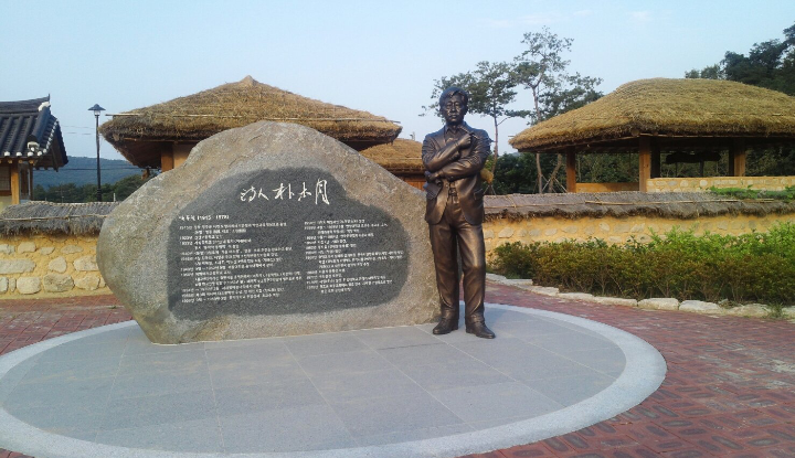 박목월 생가